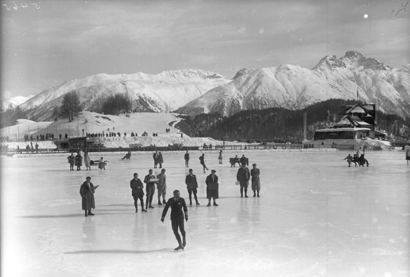 Die große Winter-Olympiade in St. Moritz! Neueste Aufnahmen von unserem nach St. Moritz entsandten Sonder-Bild-Berichterstatter. Nach kurzer Pause wurde als Erstes das Eiskunstlaufen für Herren fortgesetzt. Europameister Böckl/Wien beim Pflichtlaufen vor der Jury.